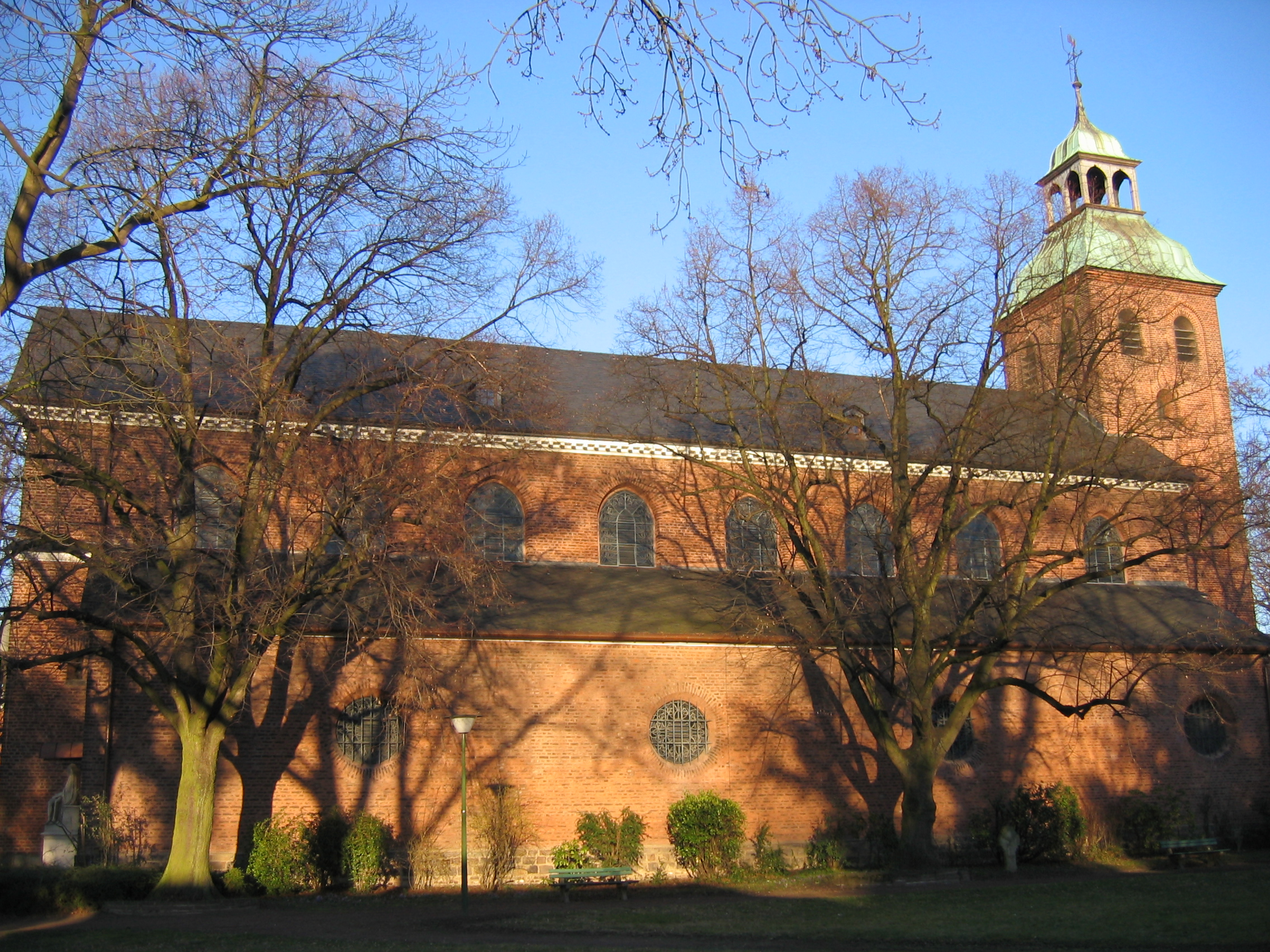 Kath. Pfarrkirche St. Remigius in Köln-Sürth